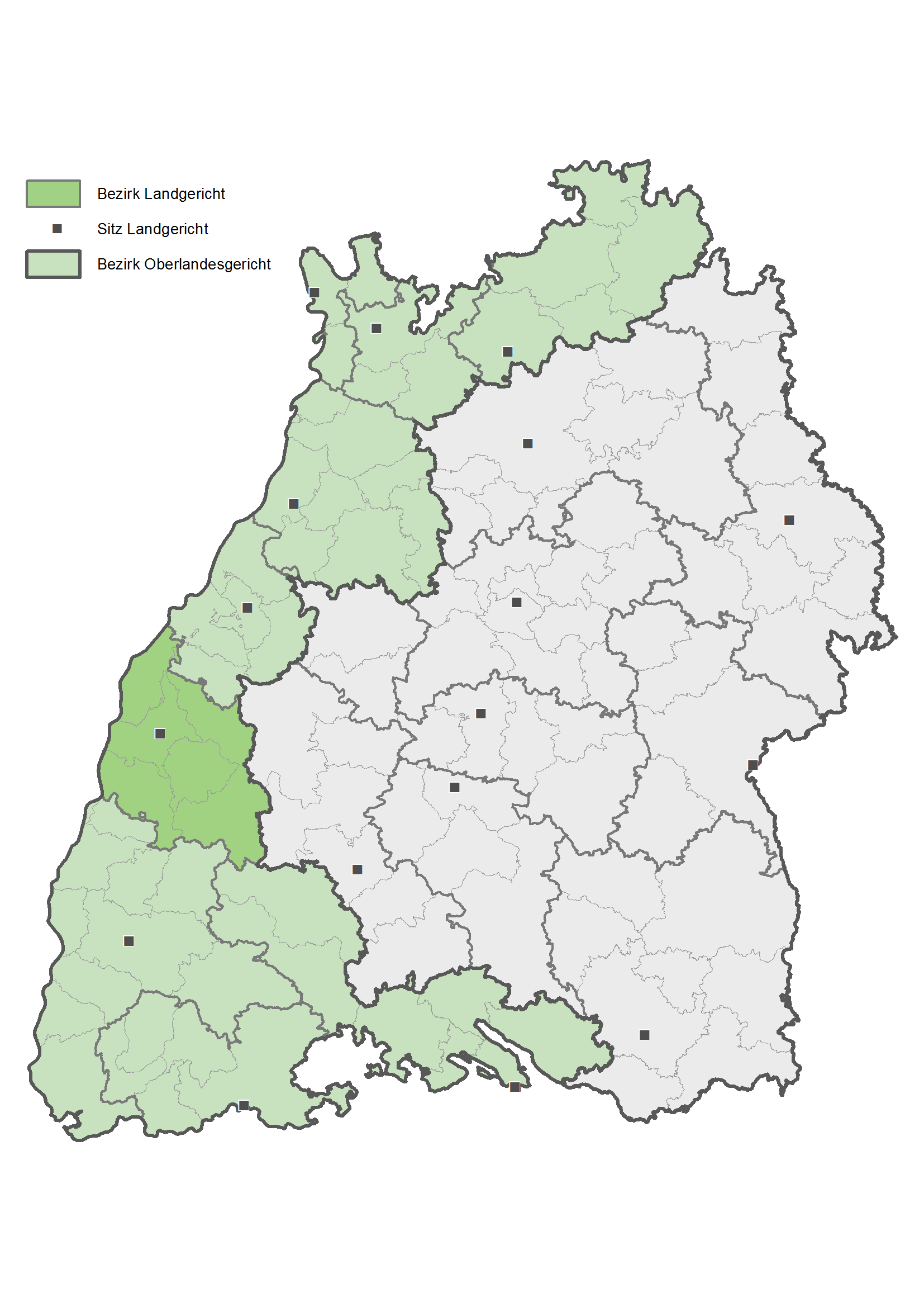 Karte des Bezirks des Landgerichts Offenburg in Baden-Württemberg